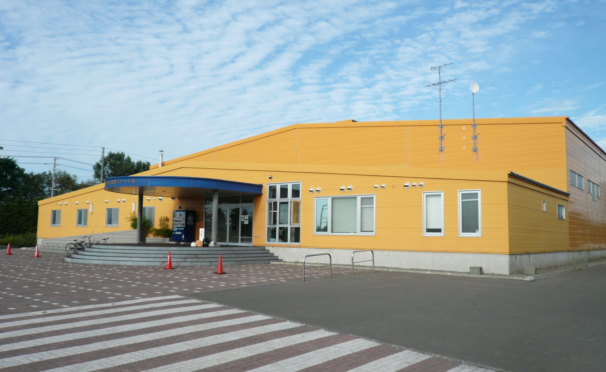 江守記念星置スケート場正面（札幌市手稲区）